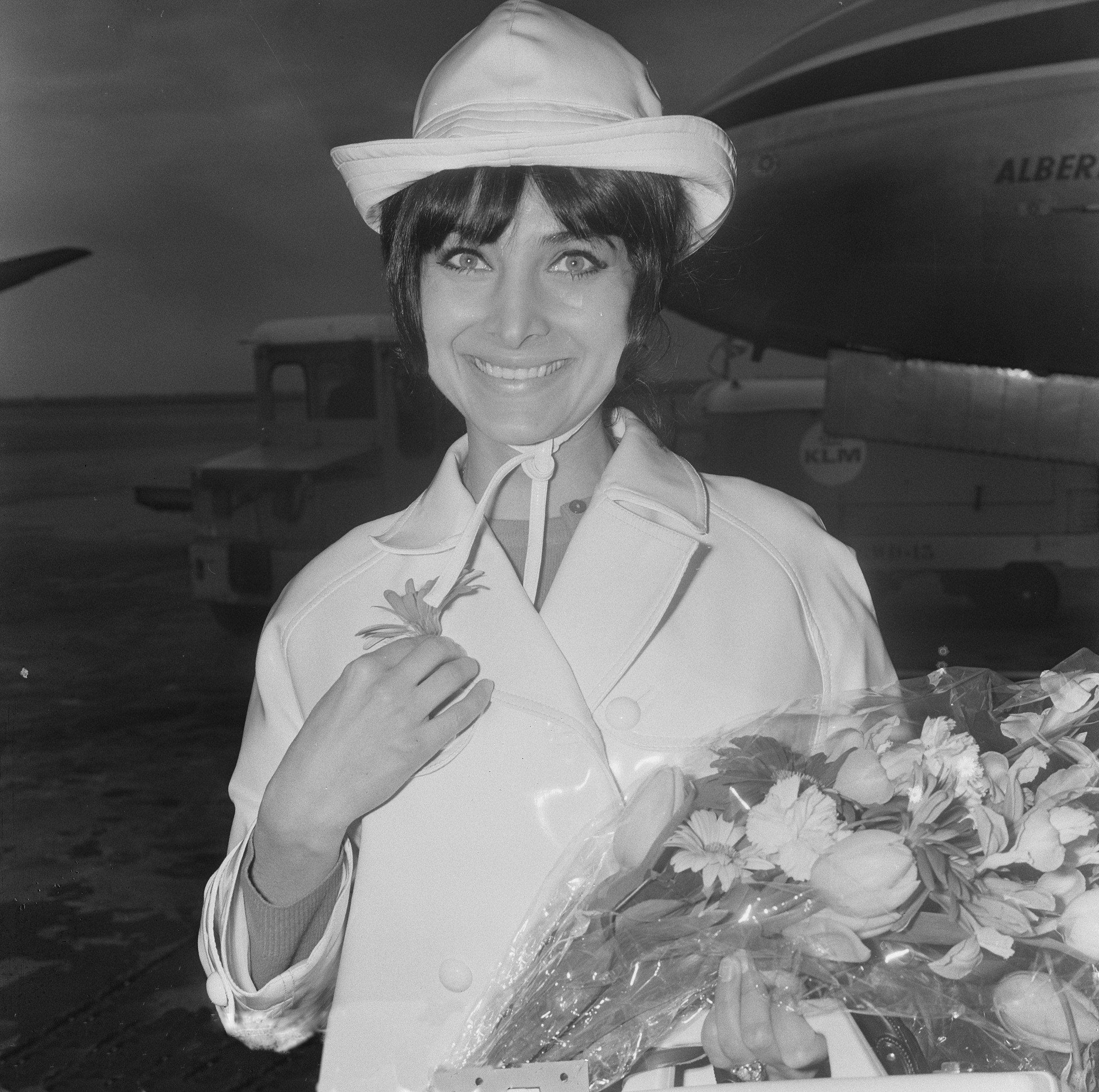 Collectie / Archief : Fotocollectie Anefo Reportage / Serie : [ onbekend ] Beschrijving : Zangeres Dunja Rajter Datum : 16 maart 1966 Trefwoorden : zangeressen Persoonsnaam : Dunja Rajter Fotograaf : Koch, Eric / Anefo Auteursrechthebbende : Nationaal Archief Materiaalsoort : Negatief (zwart/wit) Nummer archiefinventaris : bekijk toegang 2.24.01.03 Bestanddeelnummer : 918-9232